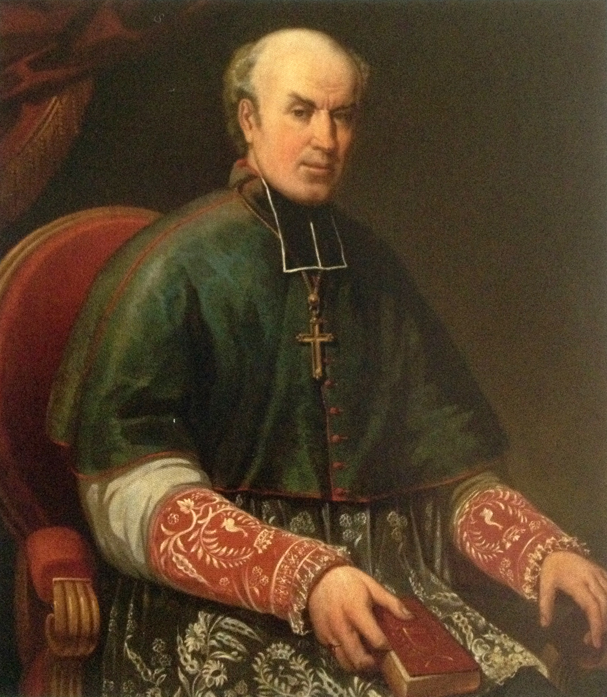 Huile sur toile de Louis Blanquart de Bailleul.